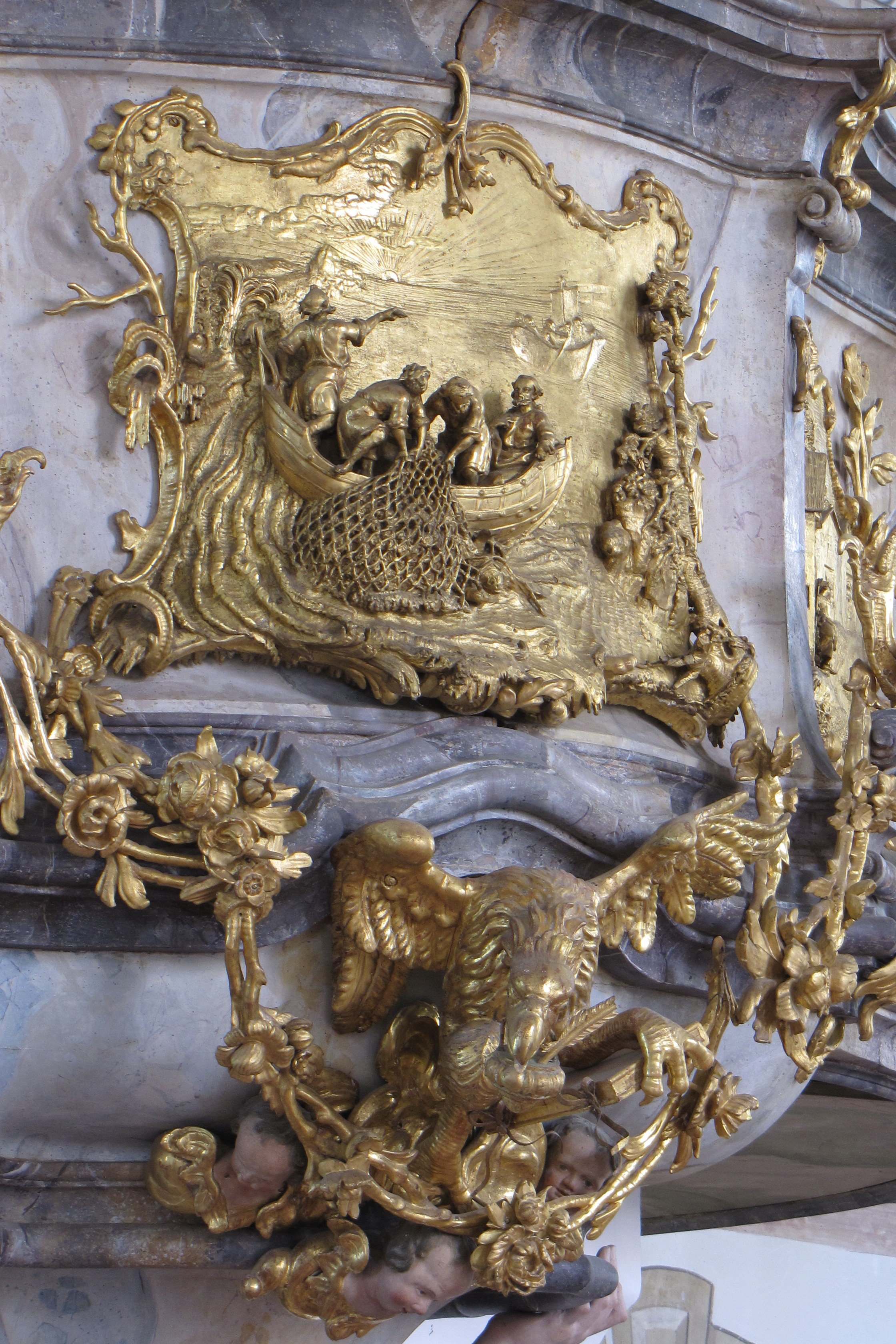 Kanzeldetail von Johann Richard Eberhart, 1762, in der Wallfahrtskirche Maria Rain